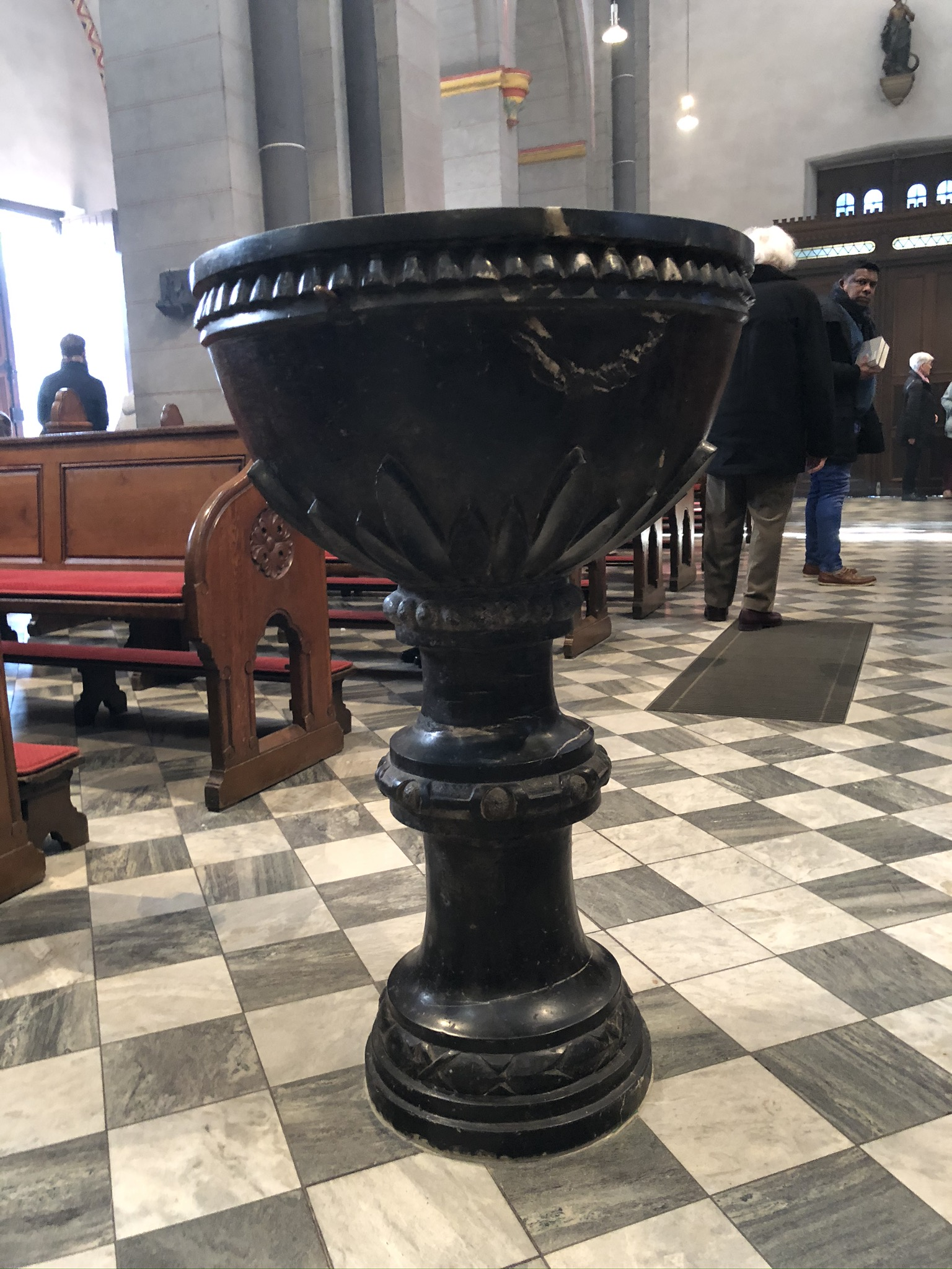 Taufstein in St. Margareta, Düsseldorf Deutschland